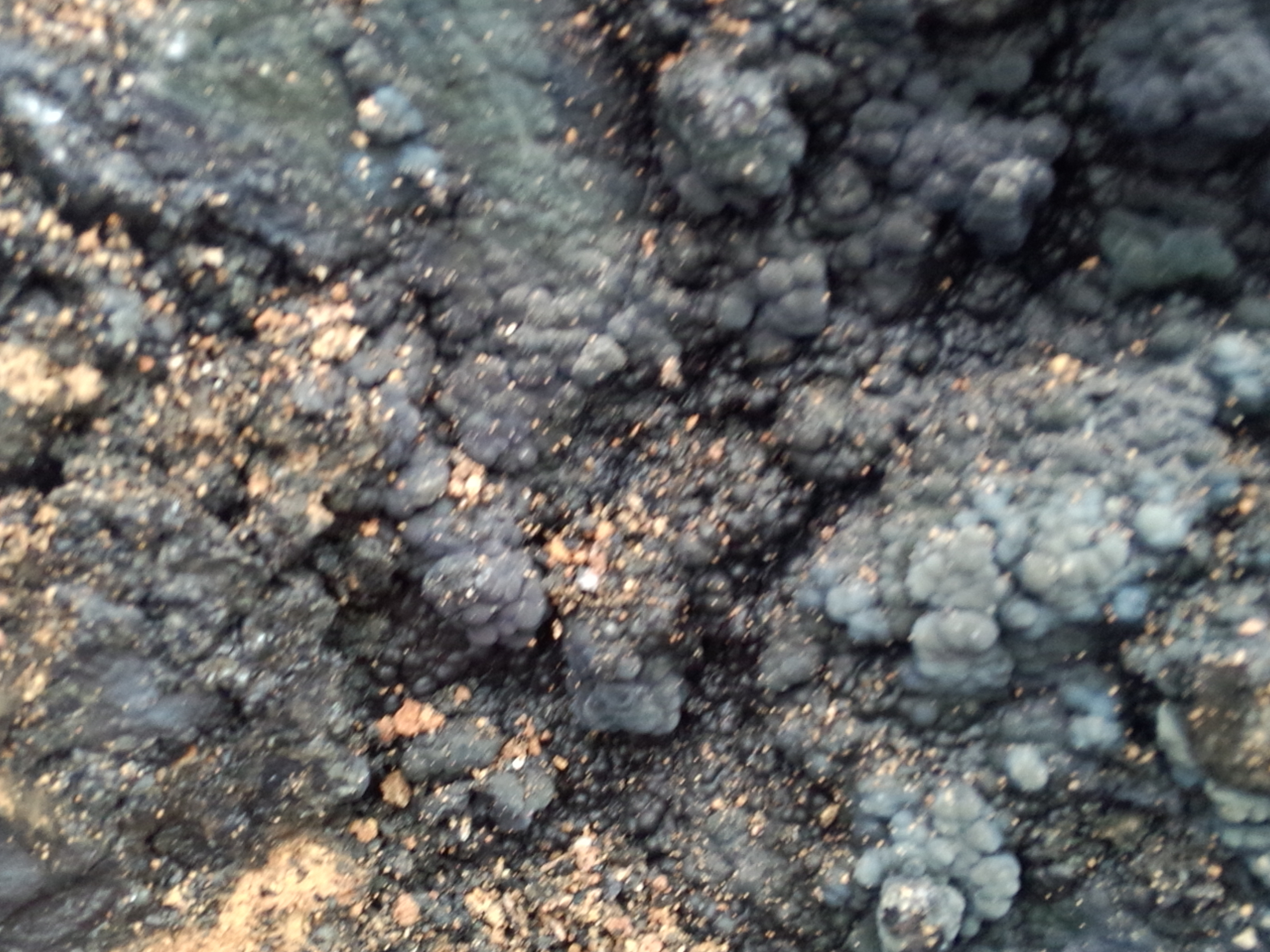 煤、原油等地（水）下可燃烧物是由地球地表面上的生物所生产的自然废弃物堆积在地表面上，经脱水、腐化、发酵并与地表泥土等物质在自然环境下混合，形成腐化混合物。由雨水(地表水、地下水)经输送通道输送到地下并沉积，在自然环境中继续腐化、发酵并炭(煤)化而形成。在煤、原油等地（水）下可燃烧物的形成过程中，水是输送腐化混合物的唯一输送工具。